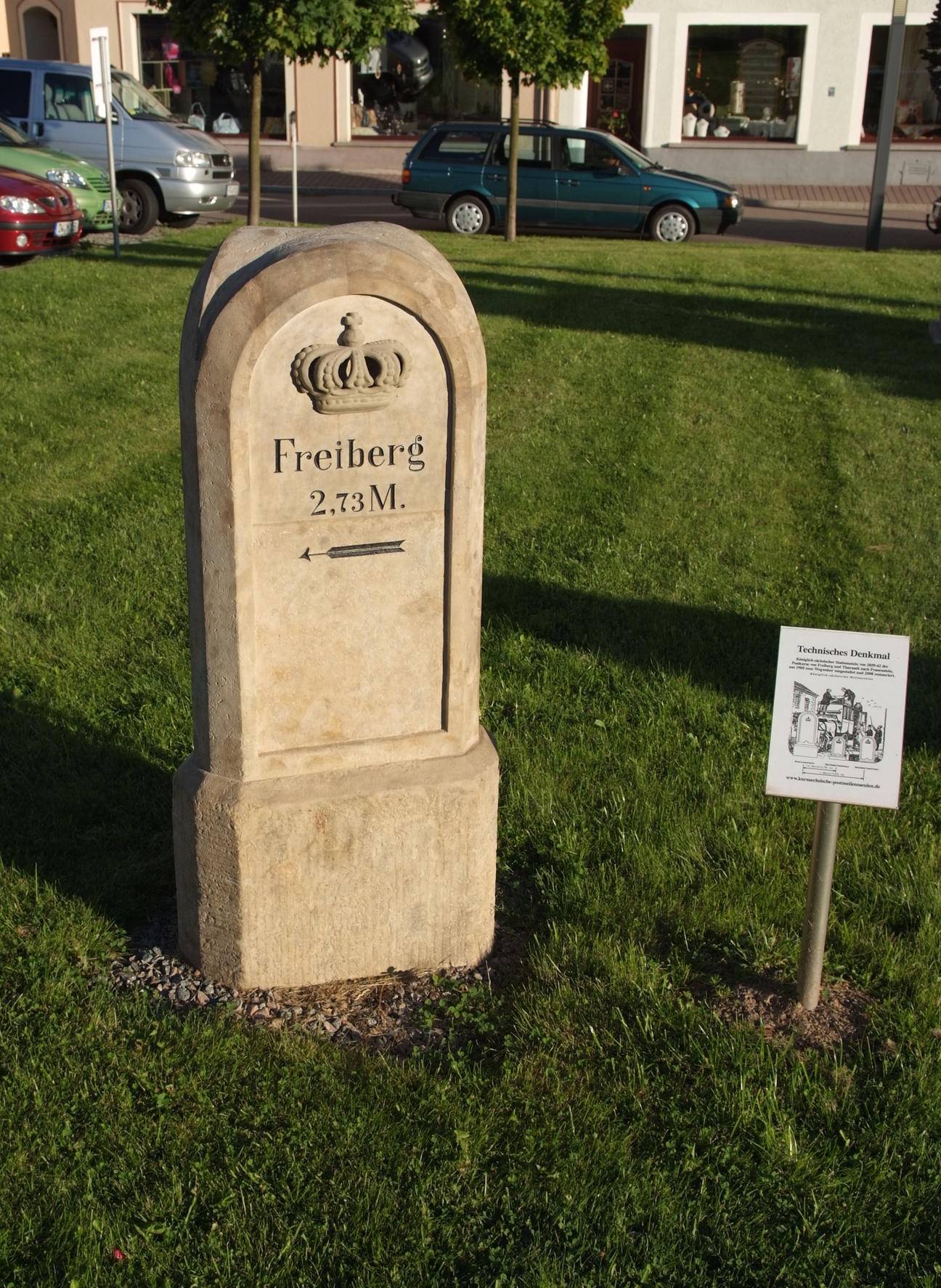 kgl.-sächs. Meilenstein in Frauenstein am Markt